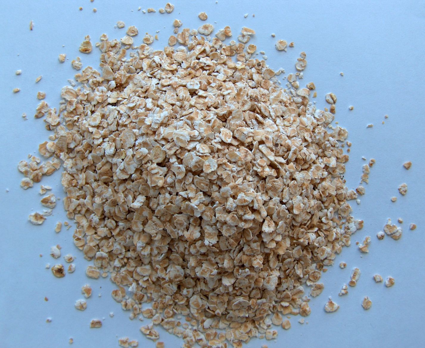 Haferflocken